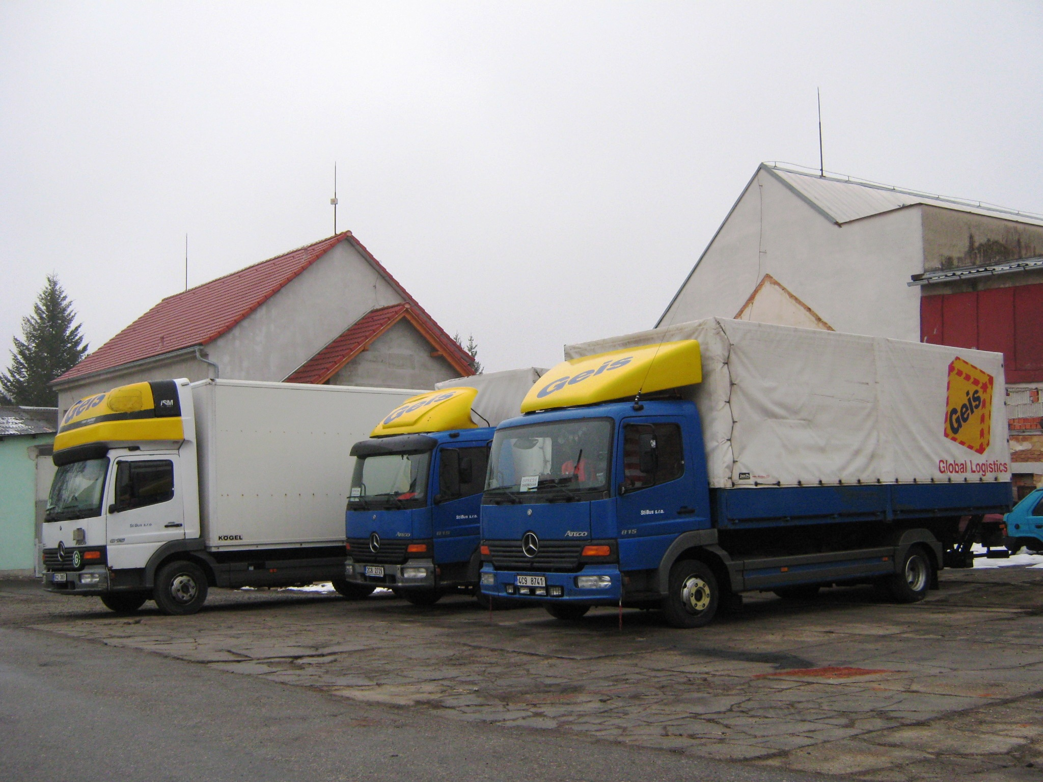 Vozidla nákladní dopravy StiBus